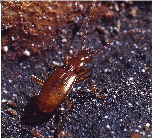 Autre Duvalius simoni